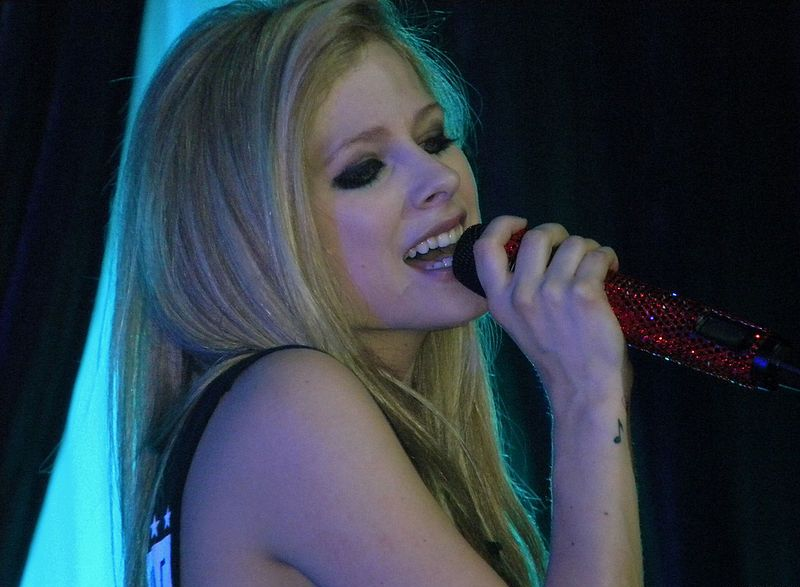 Avril Lavigne em São Paulo, Brasil.